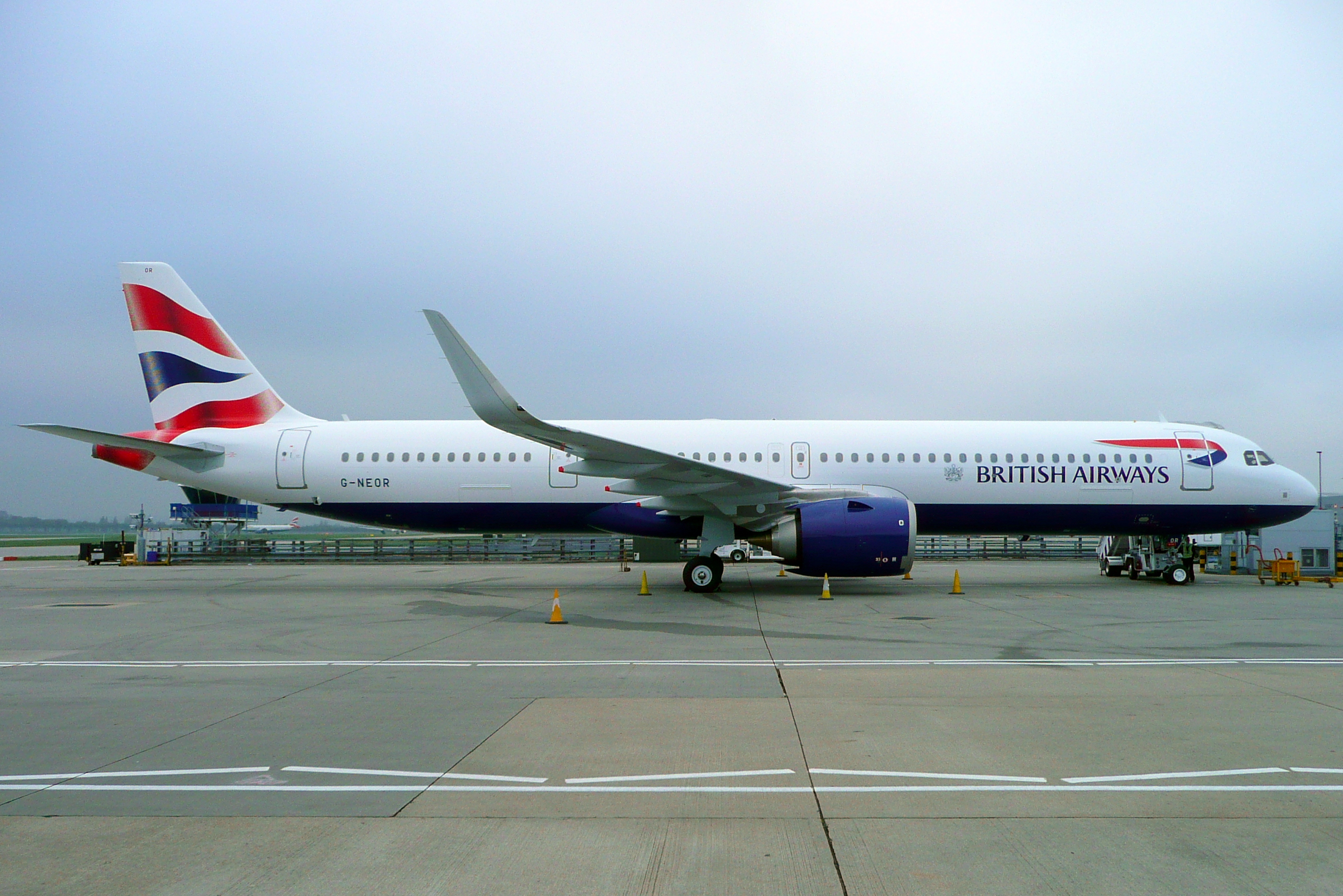 G-NEOR 23112018LHR